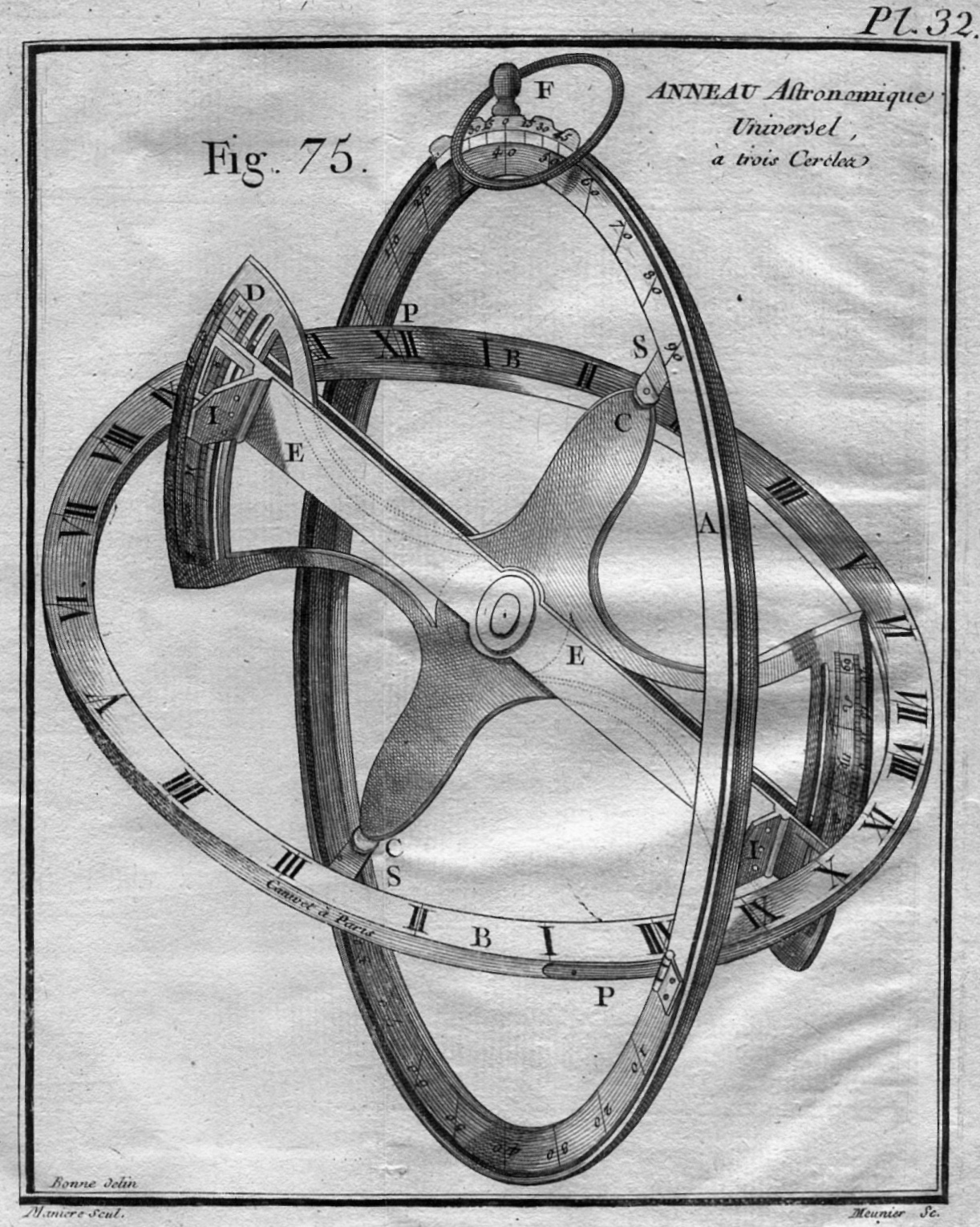 Anneau équinoxial universel à trois cercles.